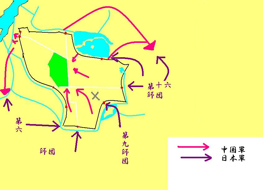 南京城攻撃の模式図